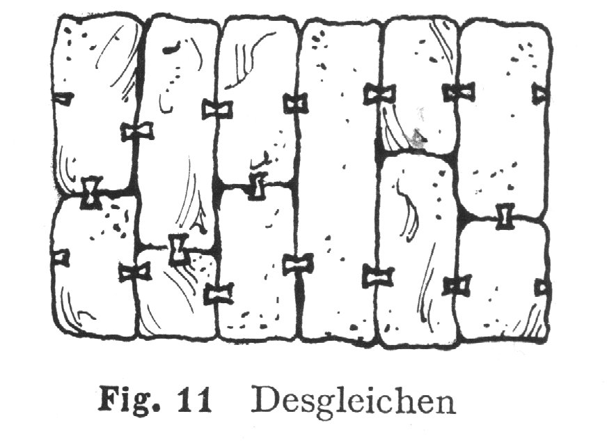 Heidenmauer am Odilienberg: Mauerverbund